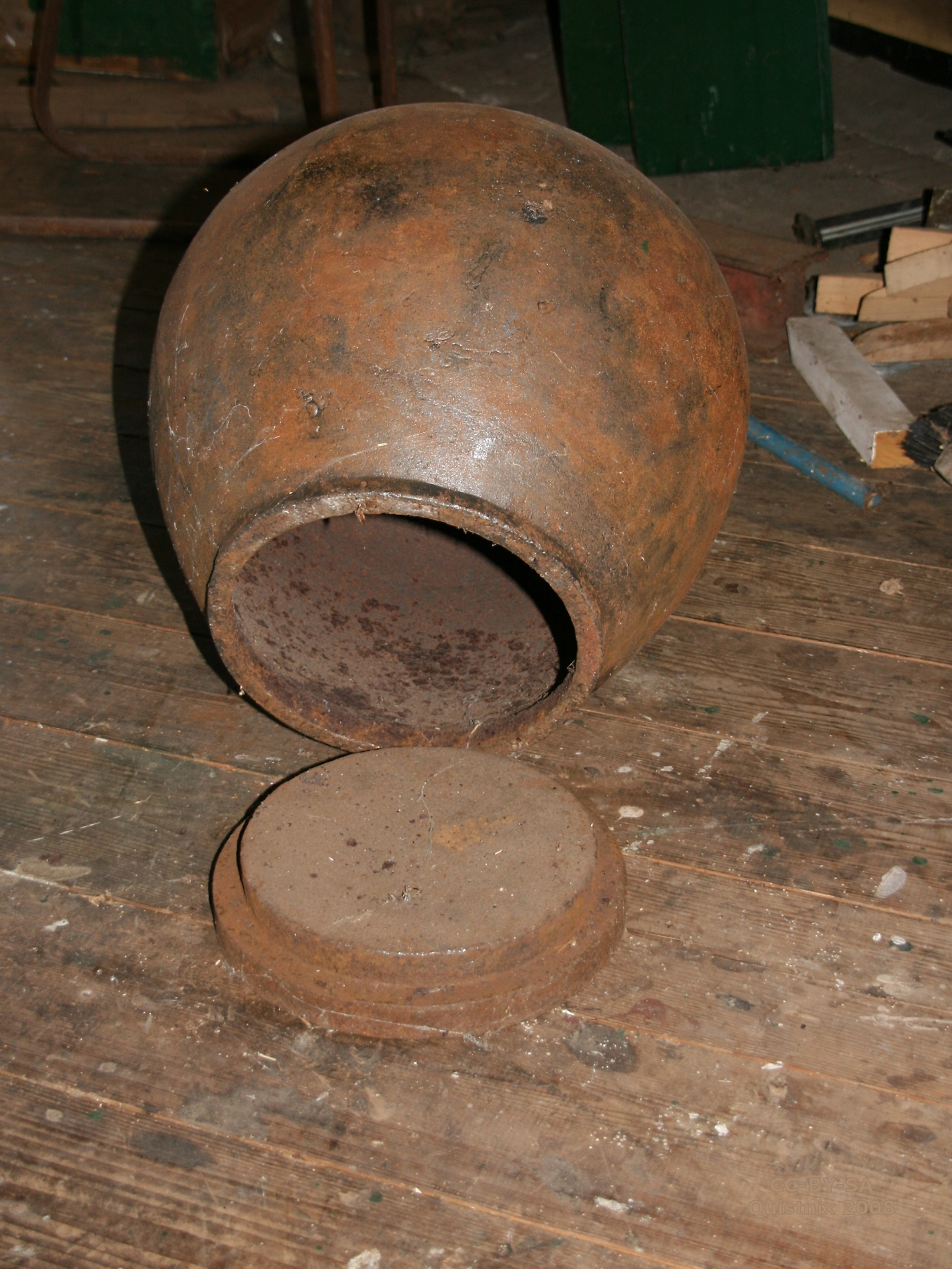 Gietijzeren "appelpot" in de molen Nooitgedacht te Veenoord